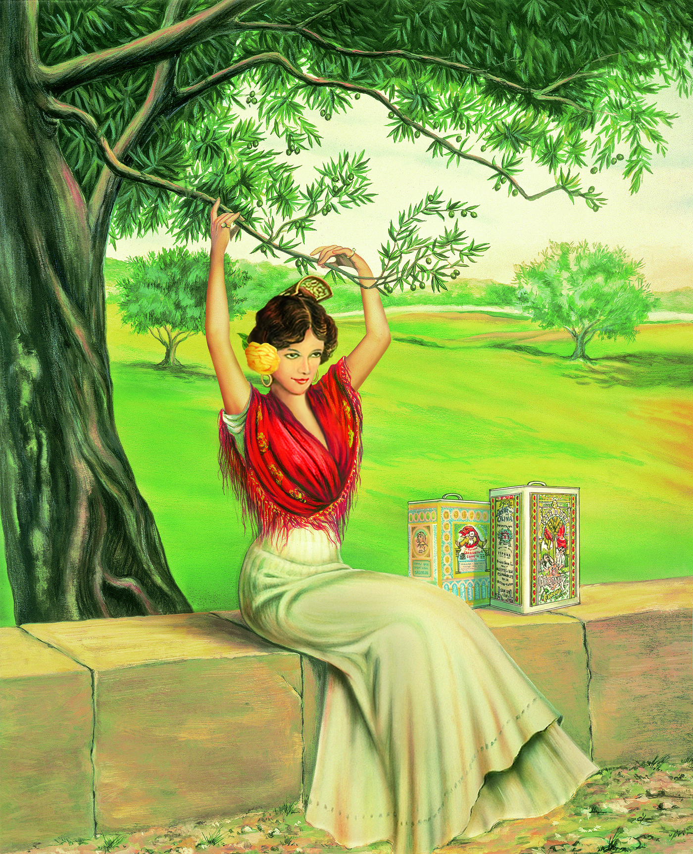 Imagen de la marca de aceites Carbonell.